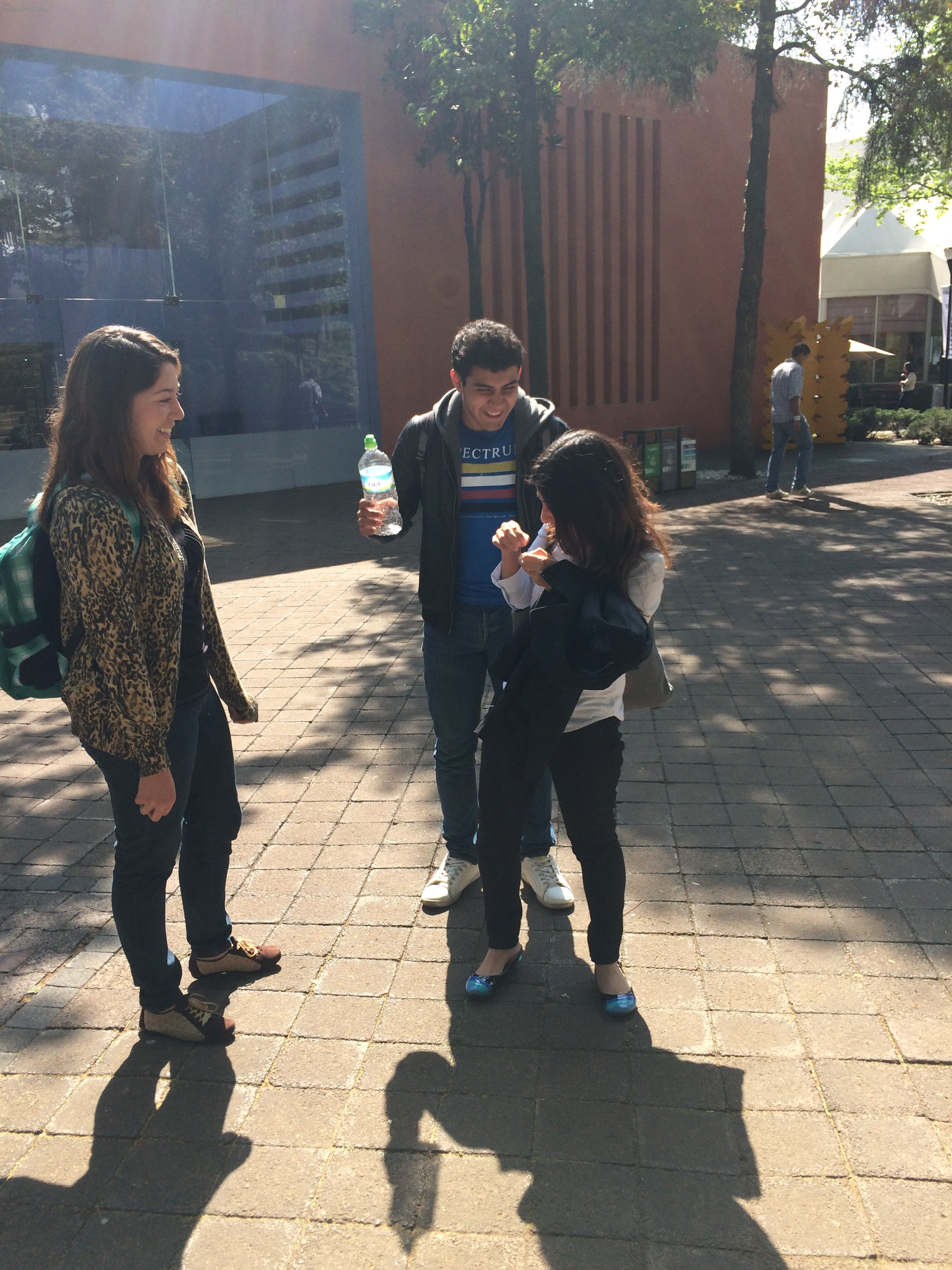 El Bullying puede ser verbal. Este tipo de bullying se puede manifestar con groserías y ofensas .